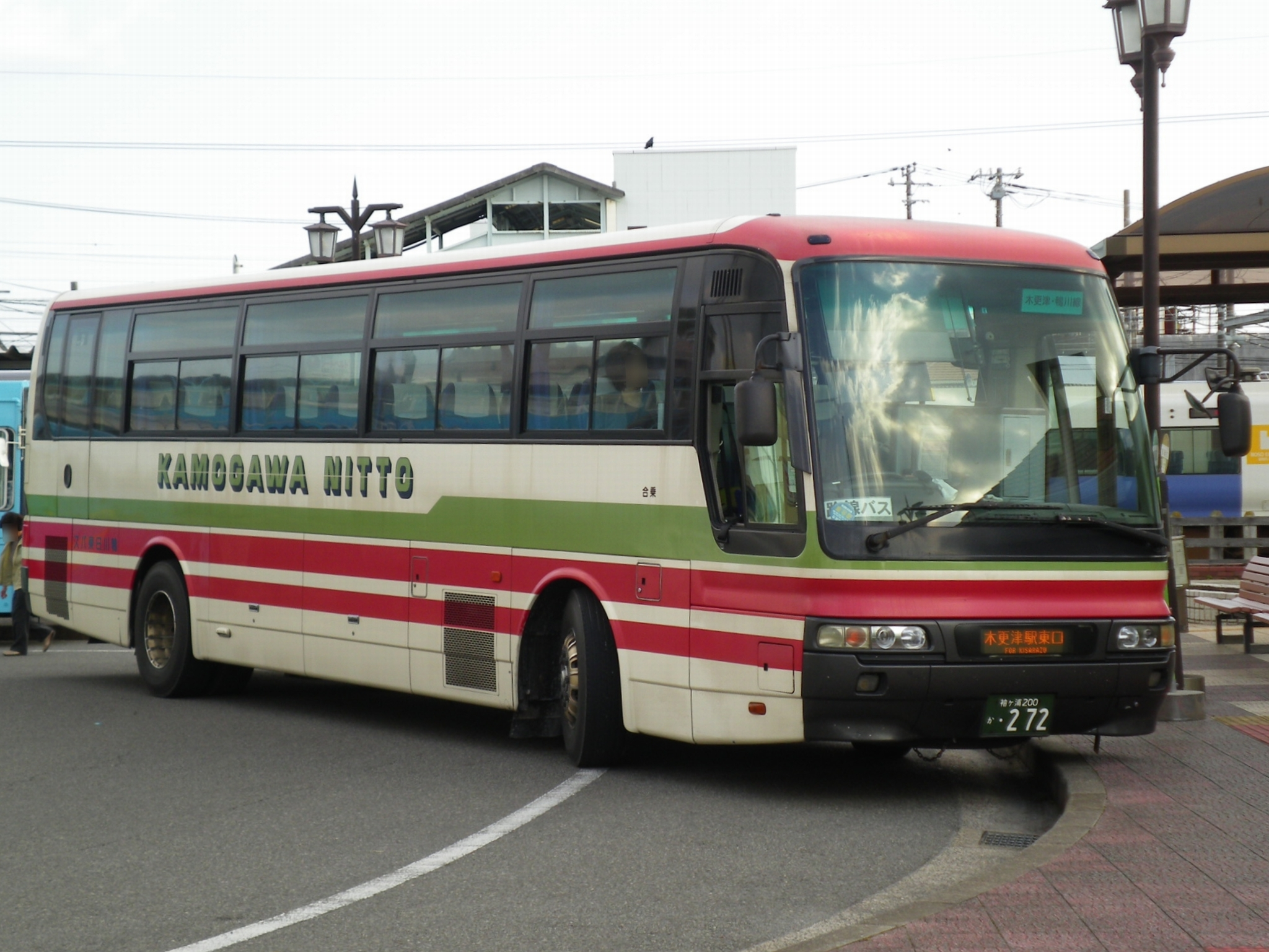 三菱ふそう・エアロバス 袖ケ浦200か272 安房鴨川駅にて撮影